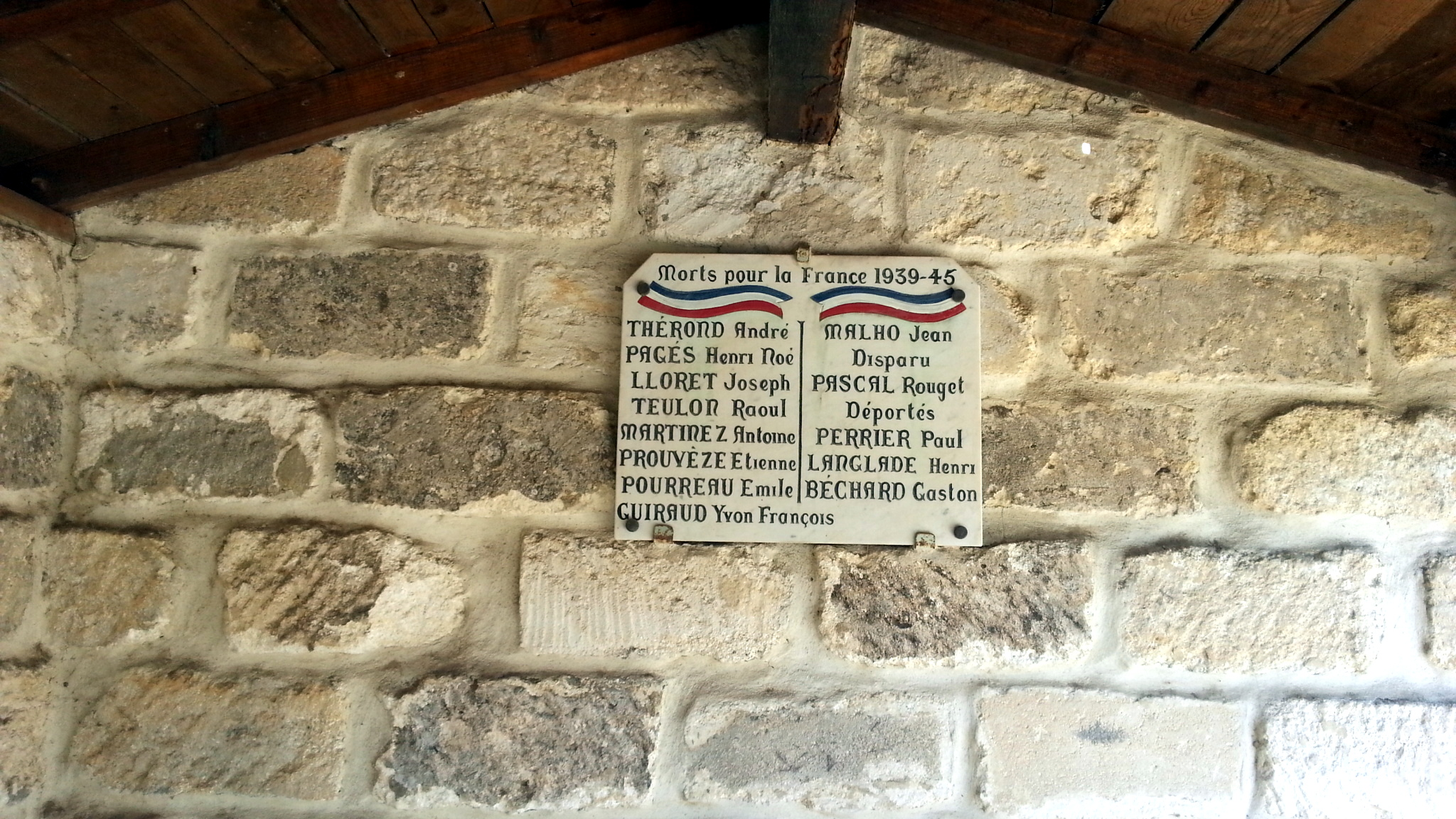 Morts pour la France 1939-45 d'Aimargues.